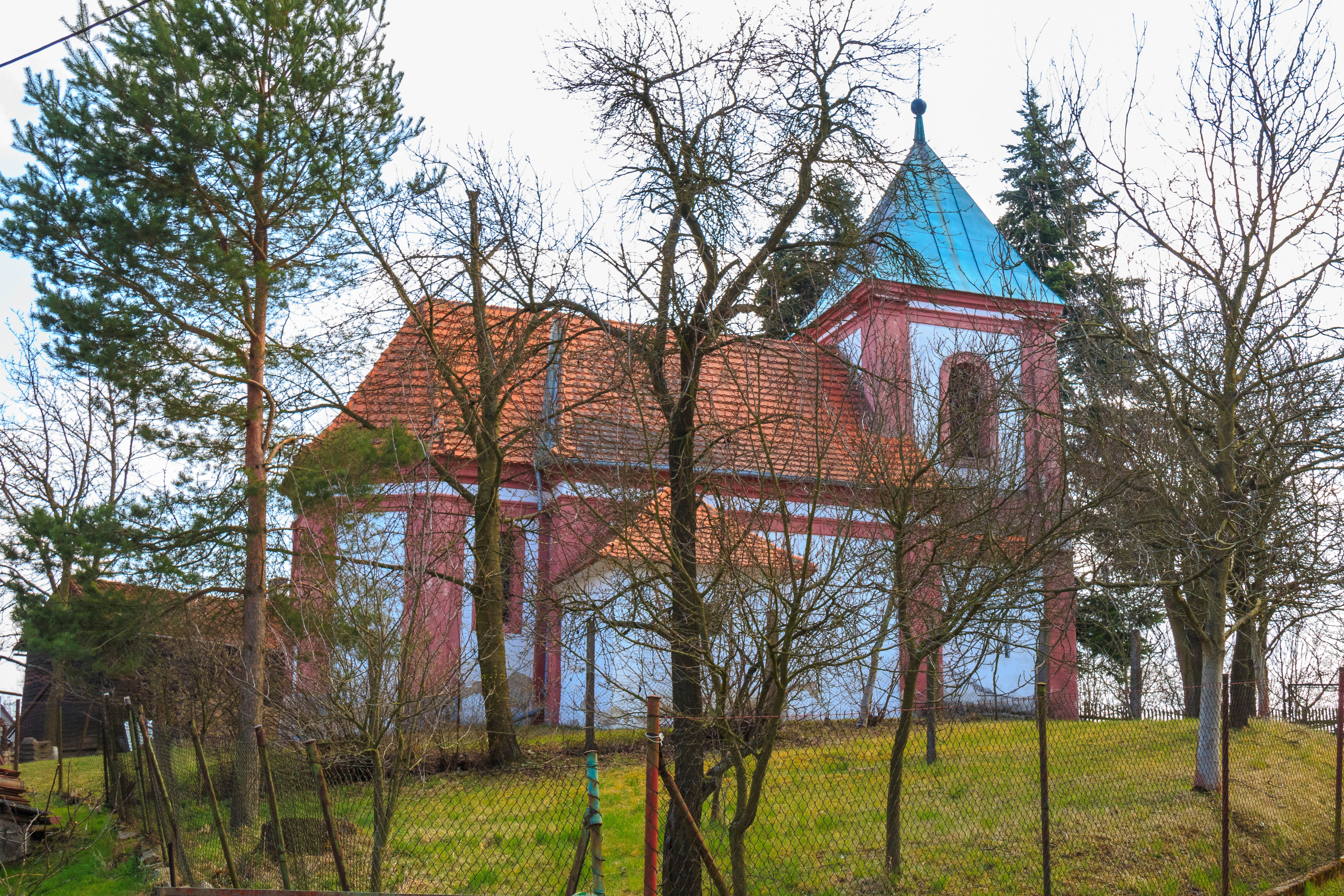 Kostel svaté Anny ve Smrčku